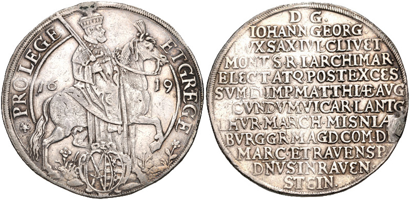 GERMANY, Sachsen-Albertinische Linie (Kurfürstentum). Johann Georg I. 1611-1656. AR Reichstaler (45mm, 28.83 g, 9h). On the Vikariat. Dresden mint. Dated 1619. Johann Georg on horseback right, holding sword / Legend in twelve lines. Davenport 7597B. VF, cleaned, removed from mount.